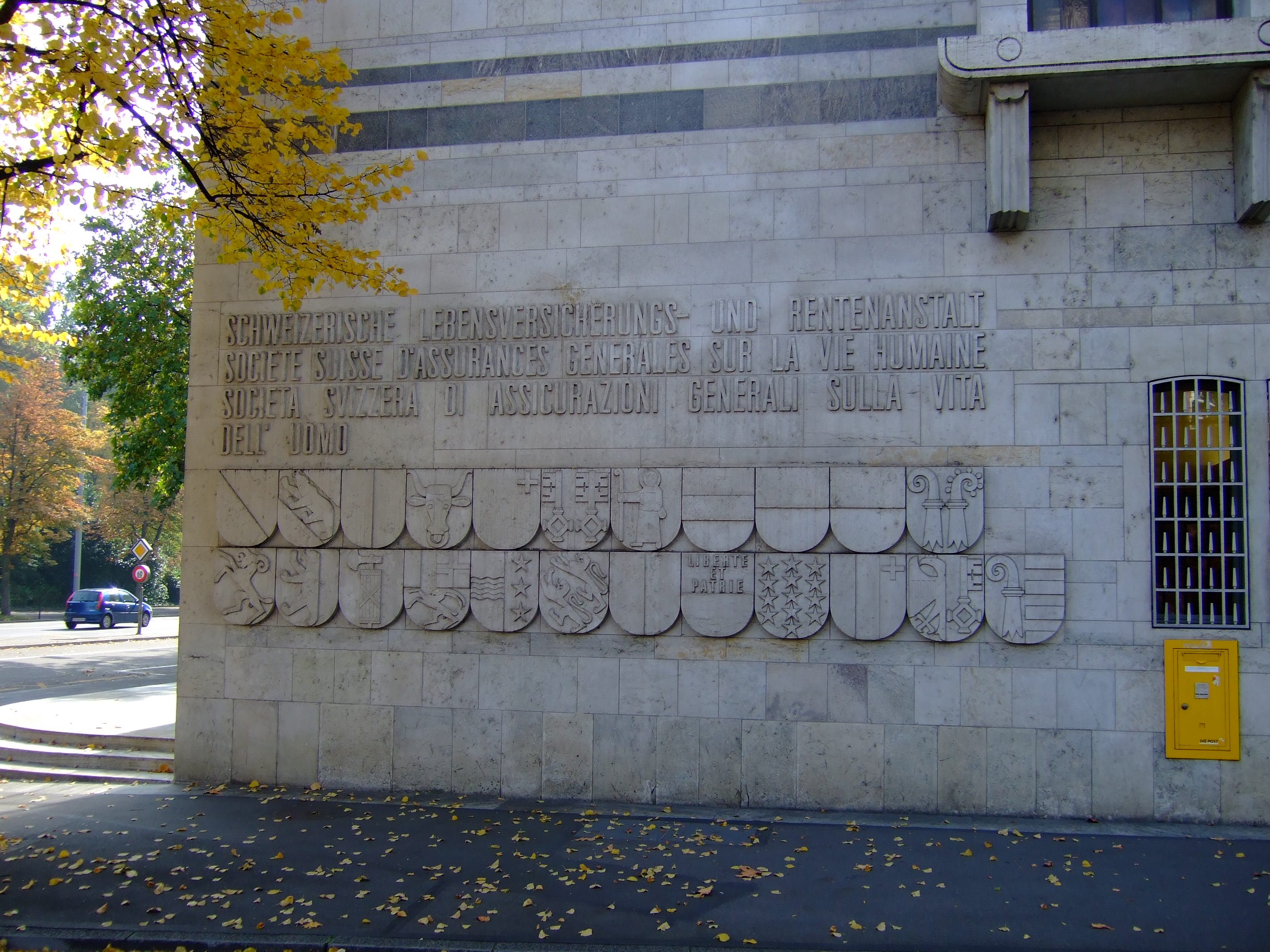 Wappen der Schweizer Kantone am Hauptsitz der Swisslife ("Rentenanstalt") in Zürich am Mythen-Quai. Erbaut 1937-1940 von Otto (1880-1959) und Werner Pfister (1884-1950) für die Schweizerische Lebensversicherungs- und Rentenanstalt. Unter Denkmalschutz seit 1995